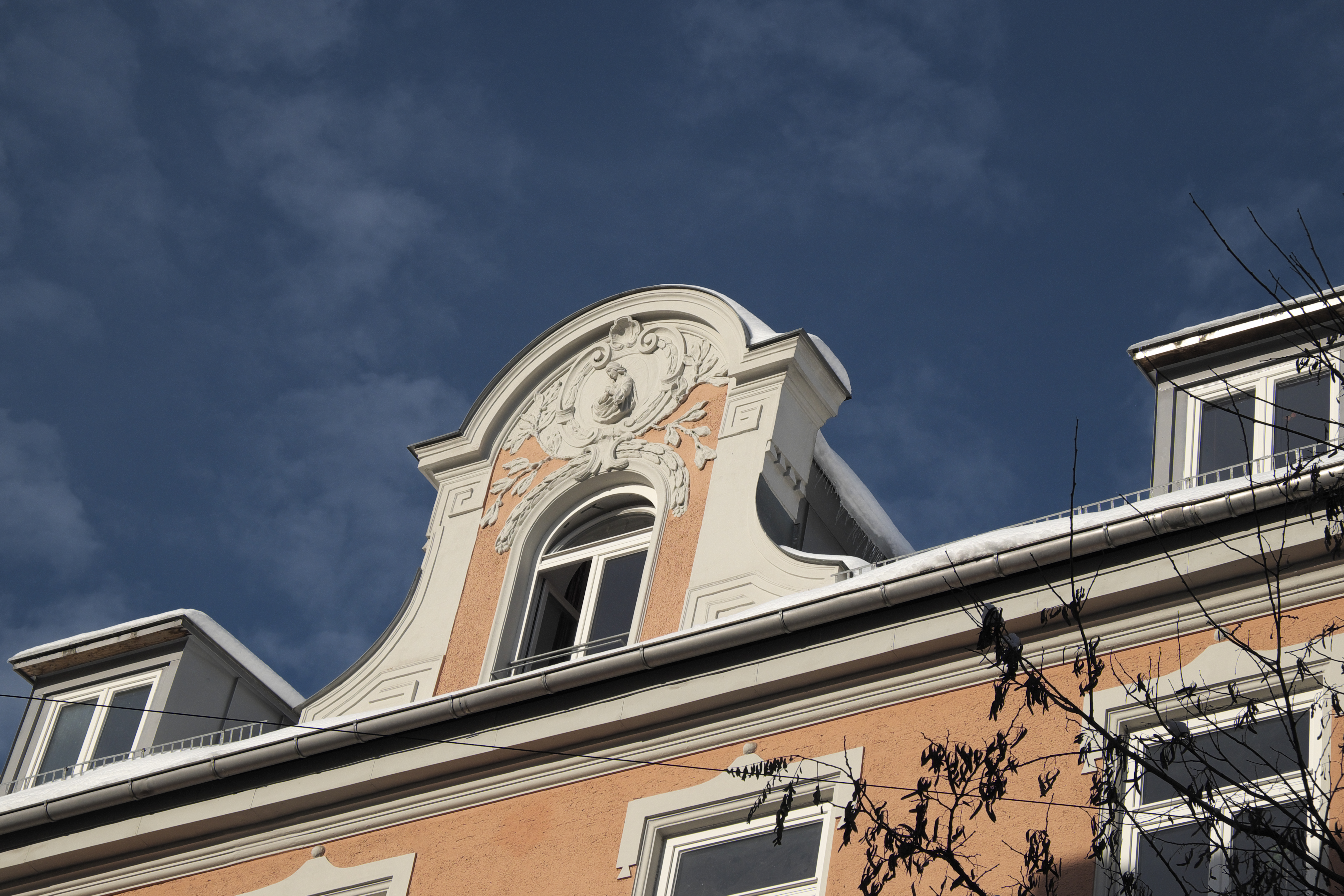 Mietshaus in der Metzstraße 31 in Haidhausen im Stadtbezirk Au-Haidhausen in München (Bayern/Deutschland), um 1890, Stuckrelief am Zwerchgiebel, Darstellung: Madonna mit Kind